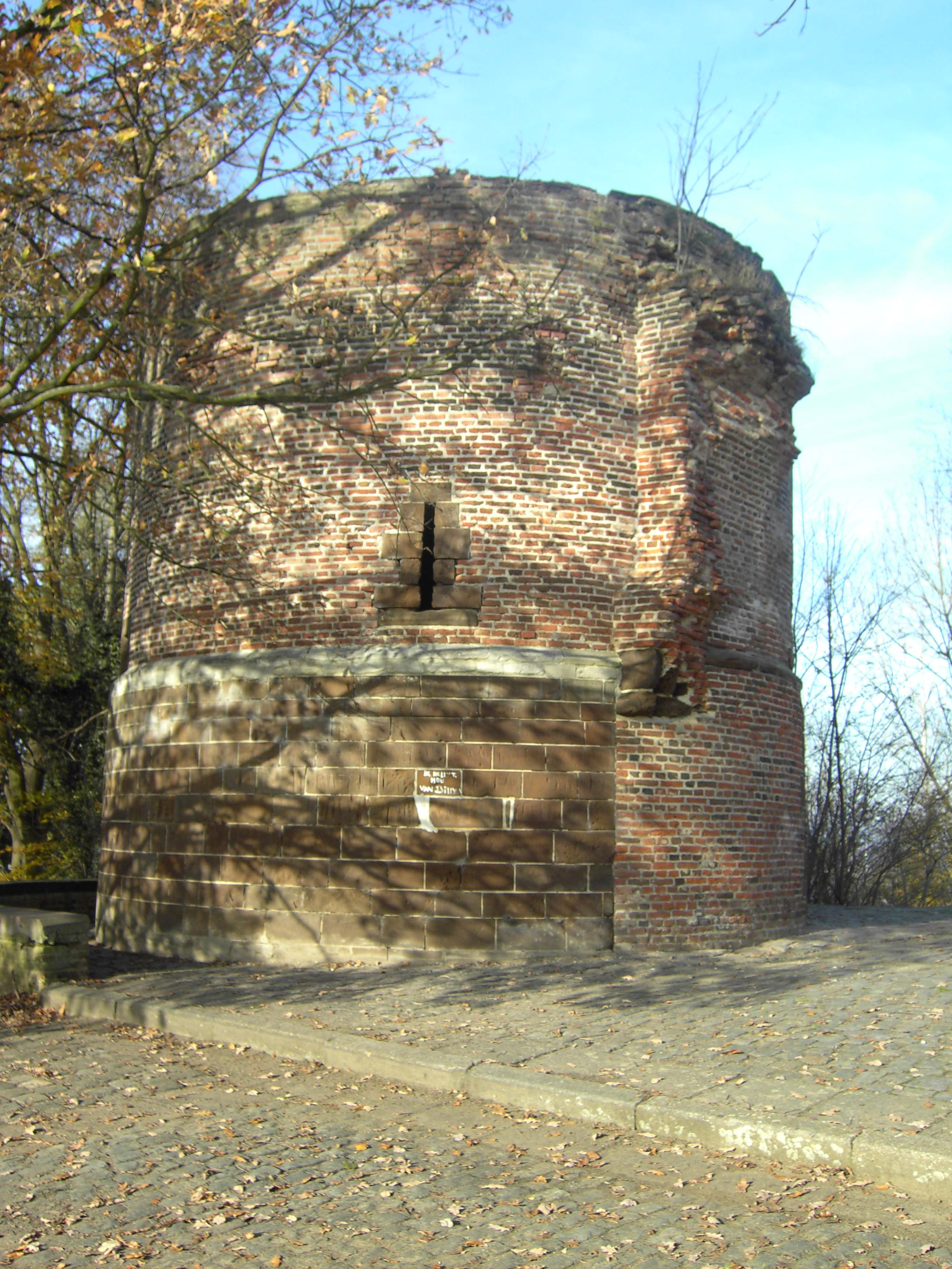 Aarschot - Orleanstoren - deel van de middeleeuwse vesting